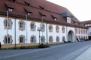 Ökonomiegebäude in Rot an der Rot